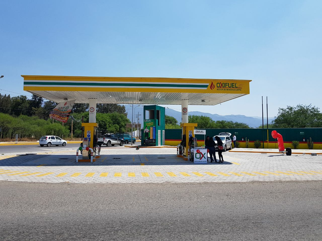 Estación de autoservicio multimodal Oxifuel